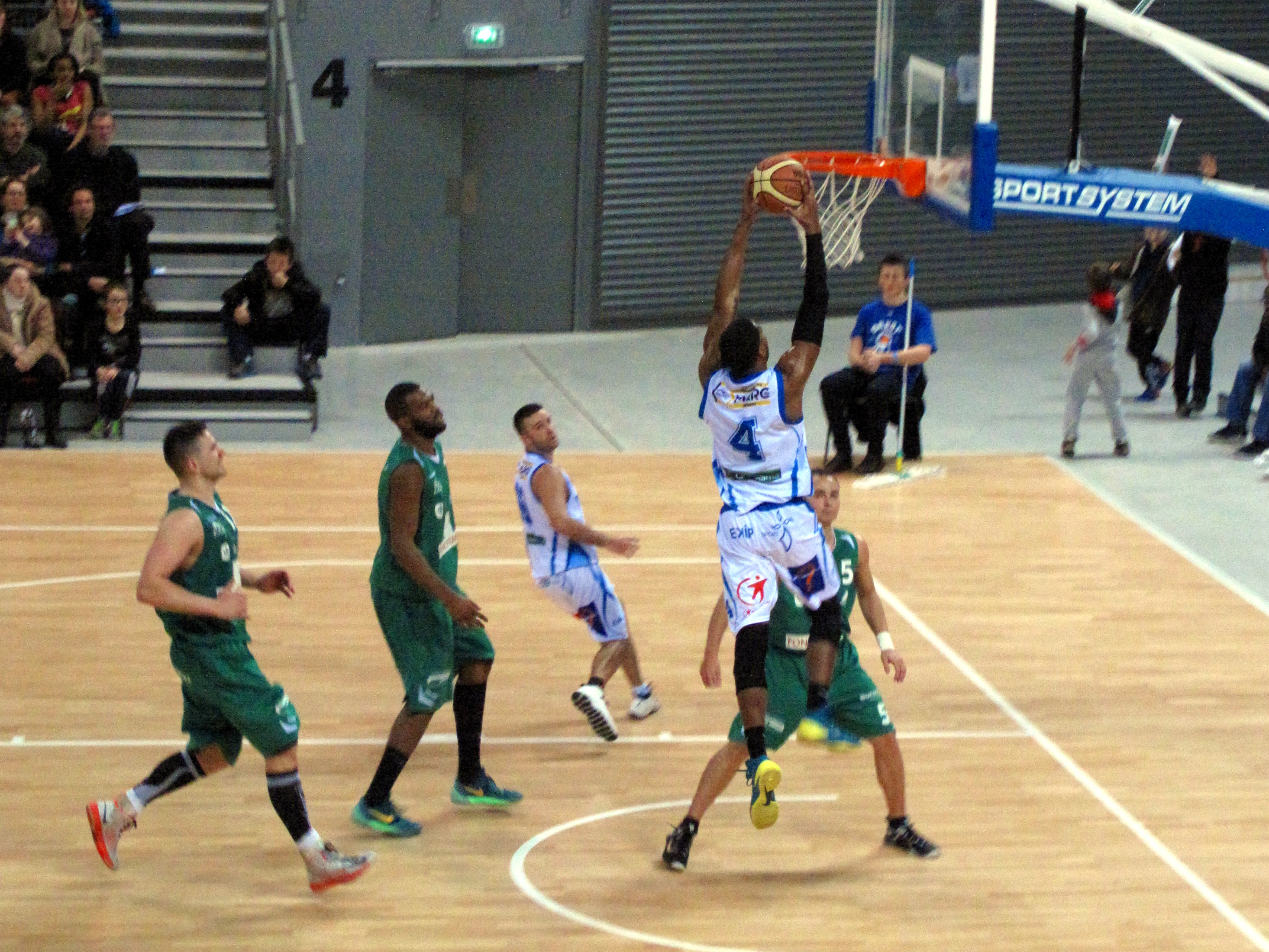 Match Etendard de Brest - Ardres à l'Arena de Brest Bruce Reed au dunk.